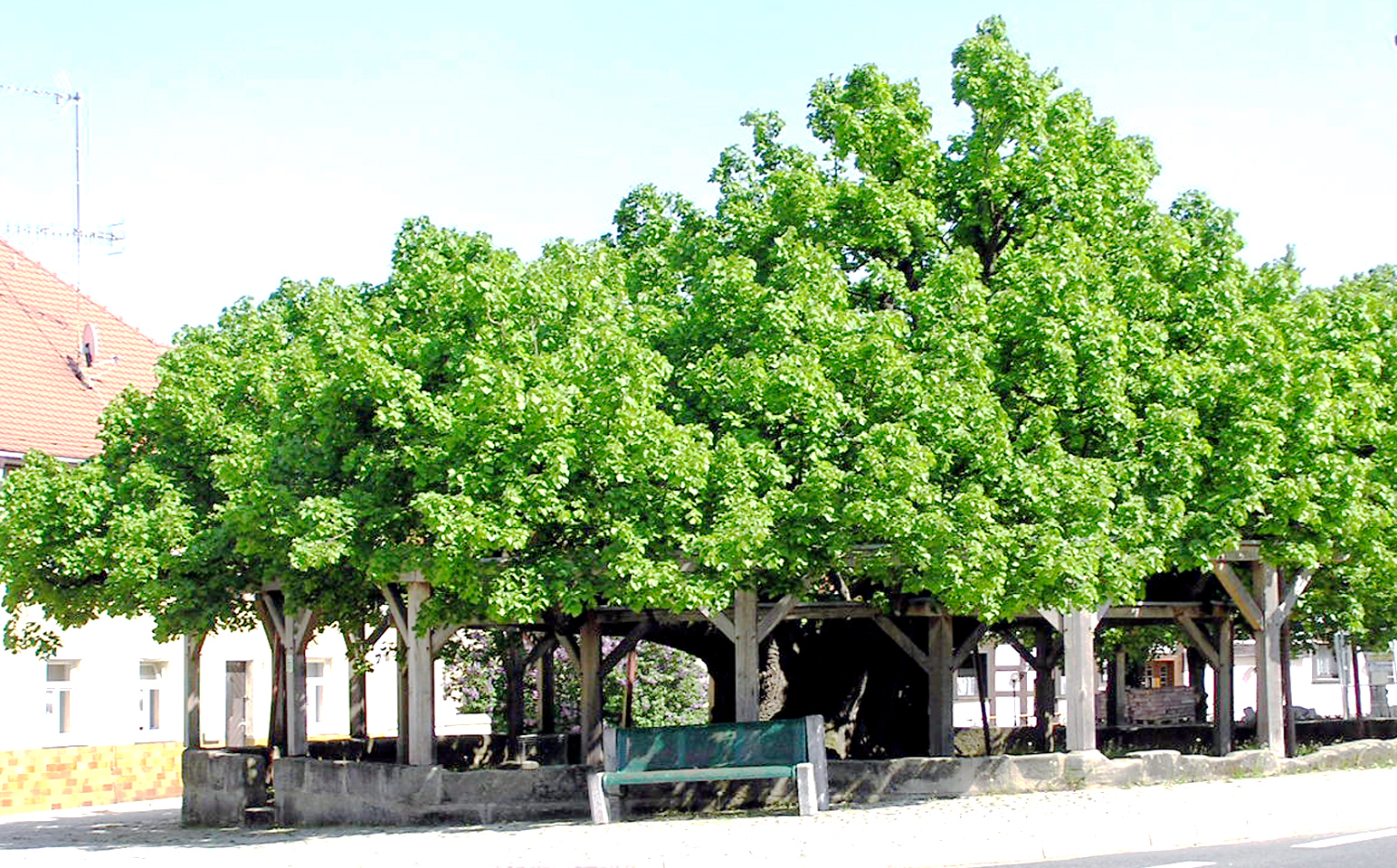 Description: „Tausendjährige Linde“ in Effeltrich, Landkreis Forchheim, Upper Franconia (Germany) Date: 12. Mai 2006 Author: --Schubbay 14:03, 26 August 2006 (UTC)-- Other versions: none